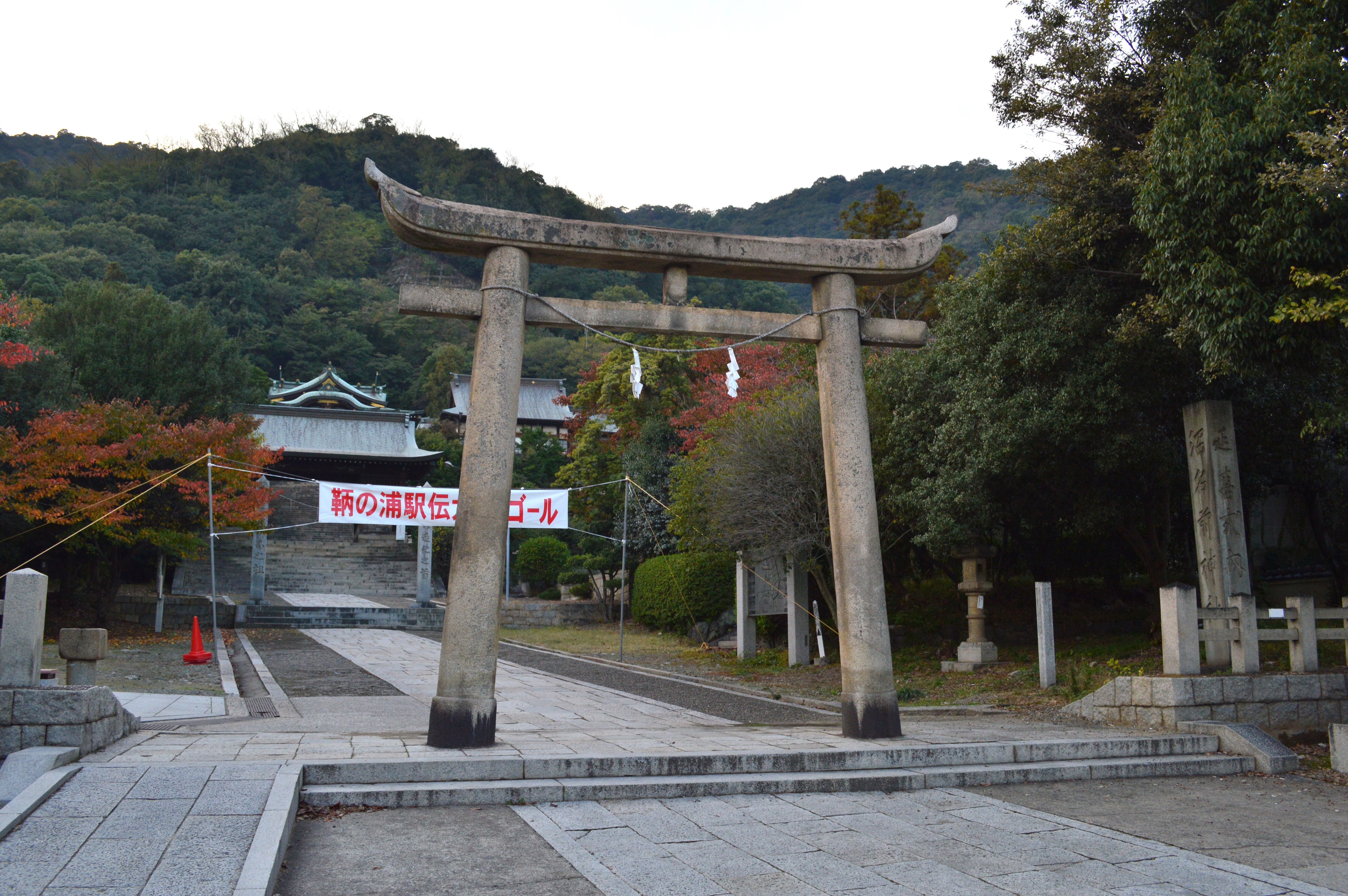 沼名前神社 二の鳥居